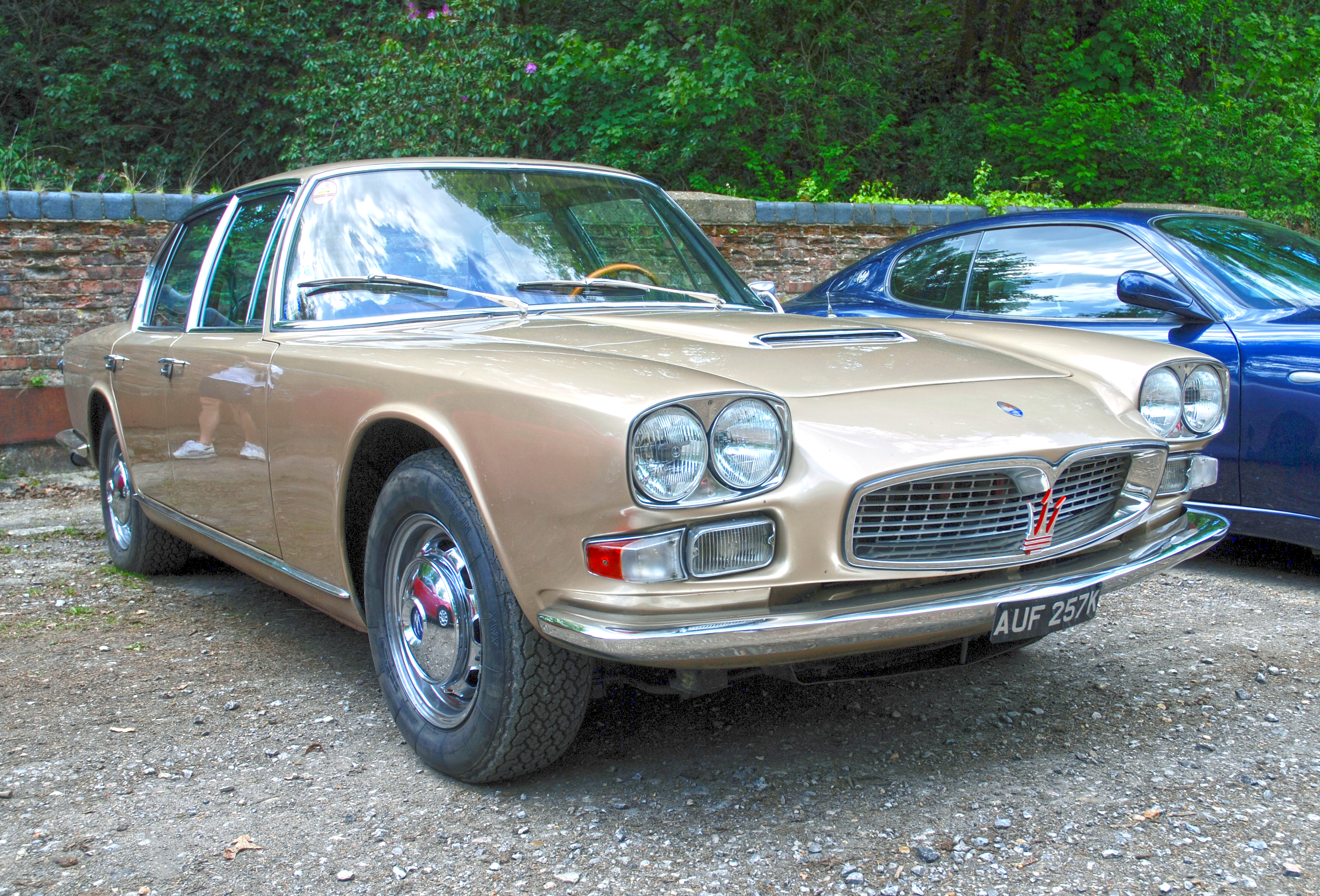 Auto Italia,May 2009